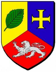 blason de la ville de verneiges